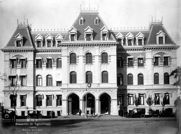 Fachada principal del Ministerio de Agricultura, terminado en 1919.